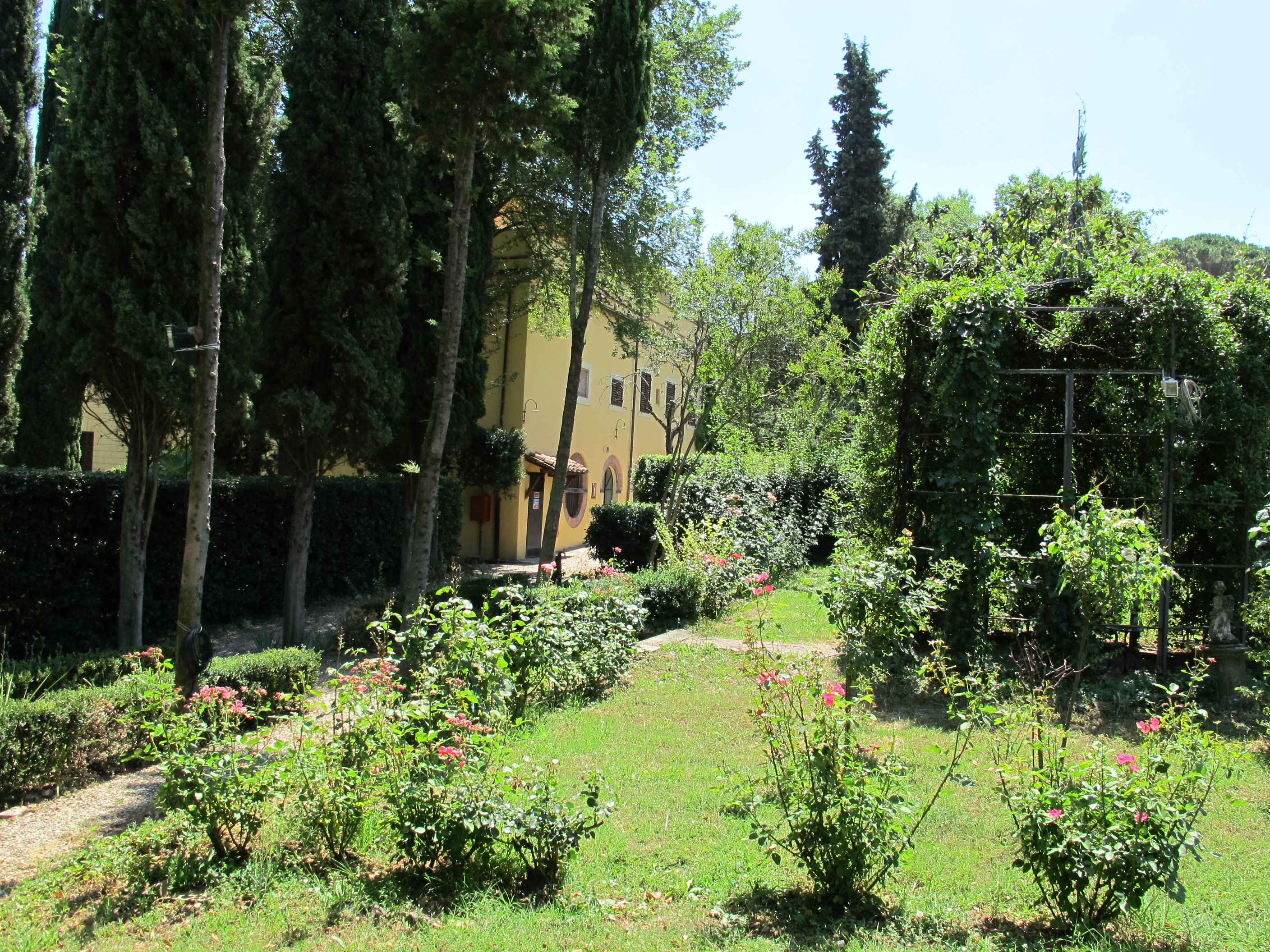 Villa romana 04 giardino